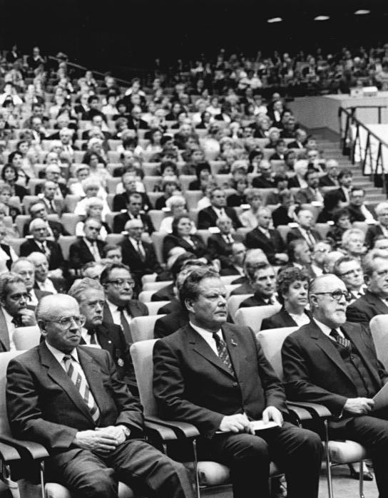 ADN-ZB Reiche 23.10.87 Berlin: Jubiläum-Staatsakt. Mit einem Staatsakt der Deutschen Demokratischen Republik im Palast der Republik fanden die Feierlichkeiten zum 750jährigen Jubiläum Berlins ihren Höhepunkt. An der festlichen Sitzung im Großen Saal nahmen u.a. auch der Vorsitzende der SEW, Horst Schmitt, der Vorsitzende der DKP, Herbert Mies, und der Stellvertreter des Vorsitzenden des Staatsrates und des Ministerrates der Republik Kuba, Carlos Rafael Rodriguez (v.l.n.r.), teil.